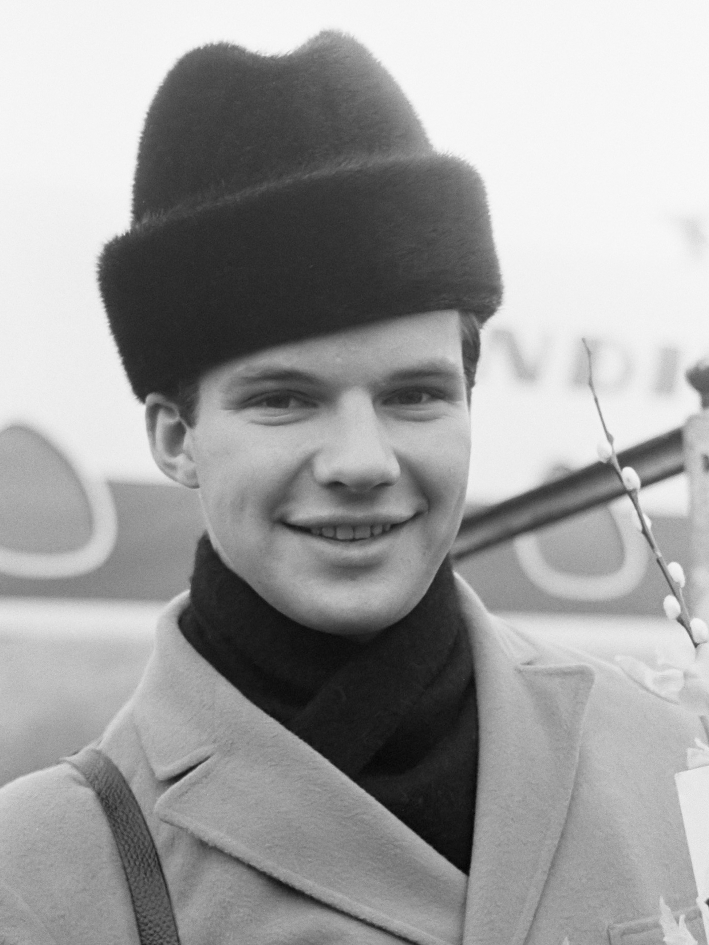 Aankomst Bobby Vee (zanger) op Schiphol 26 januari 1962